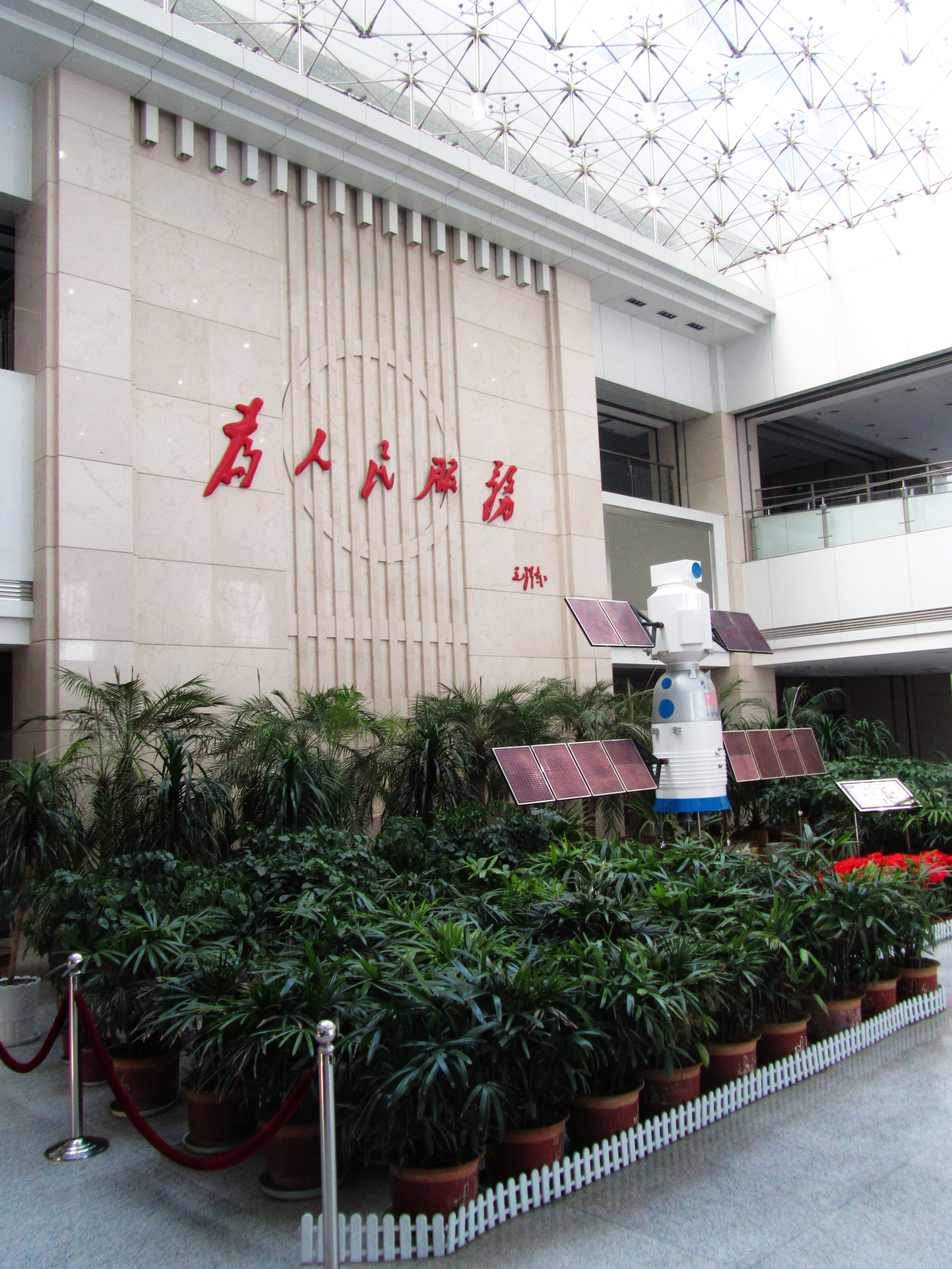 滕州市人民政府大楼内部。